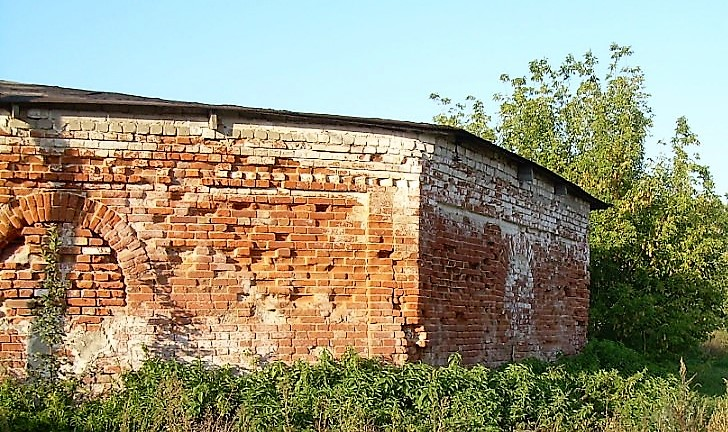 Фото сделанное в имении Терпигоревых/ Manege stables in the Terpigoreva manor of the village of Nikolskoe (modern - Dobrinka, Lipetsk region)..